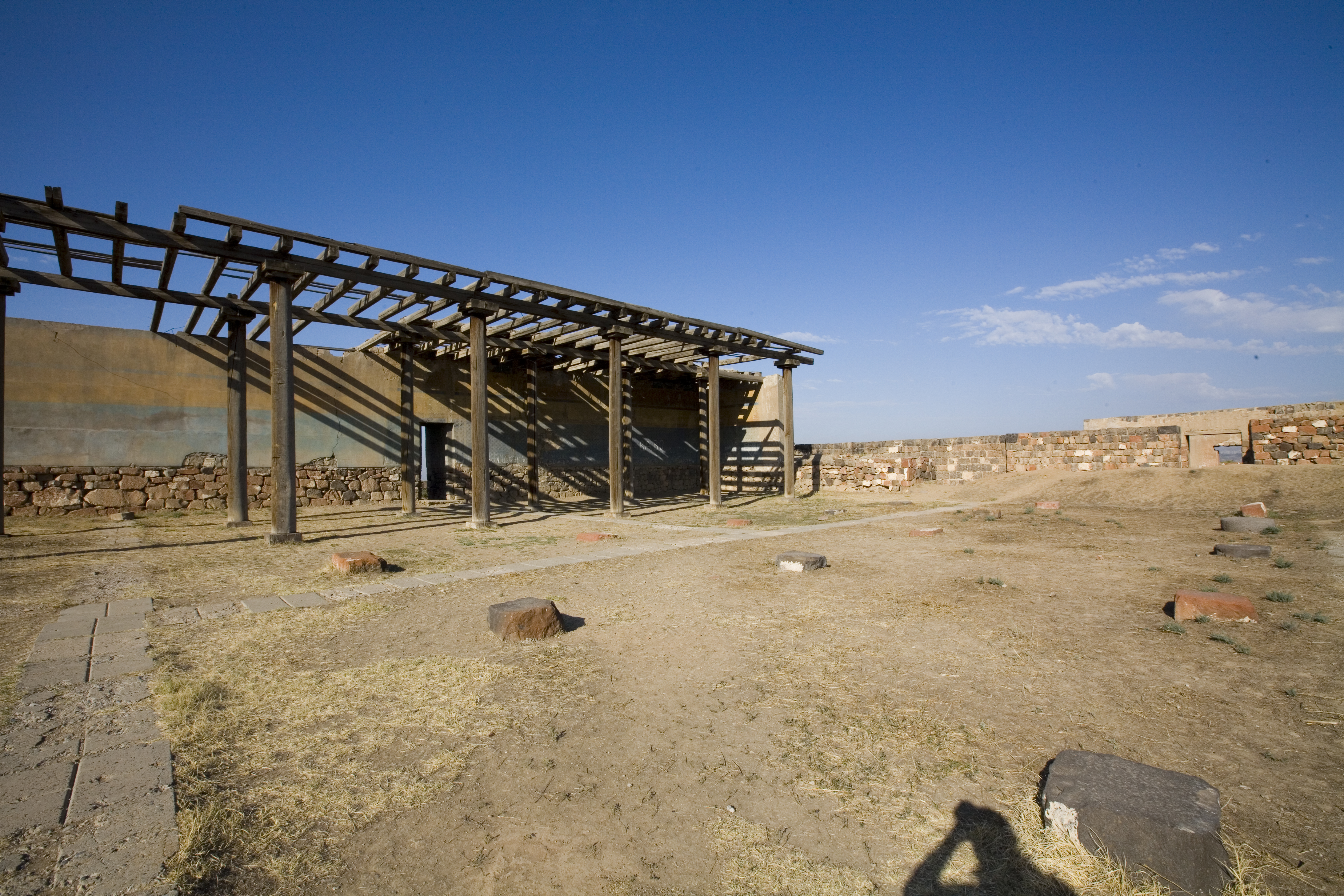 Urartian temple in Erebuni